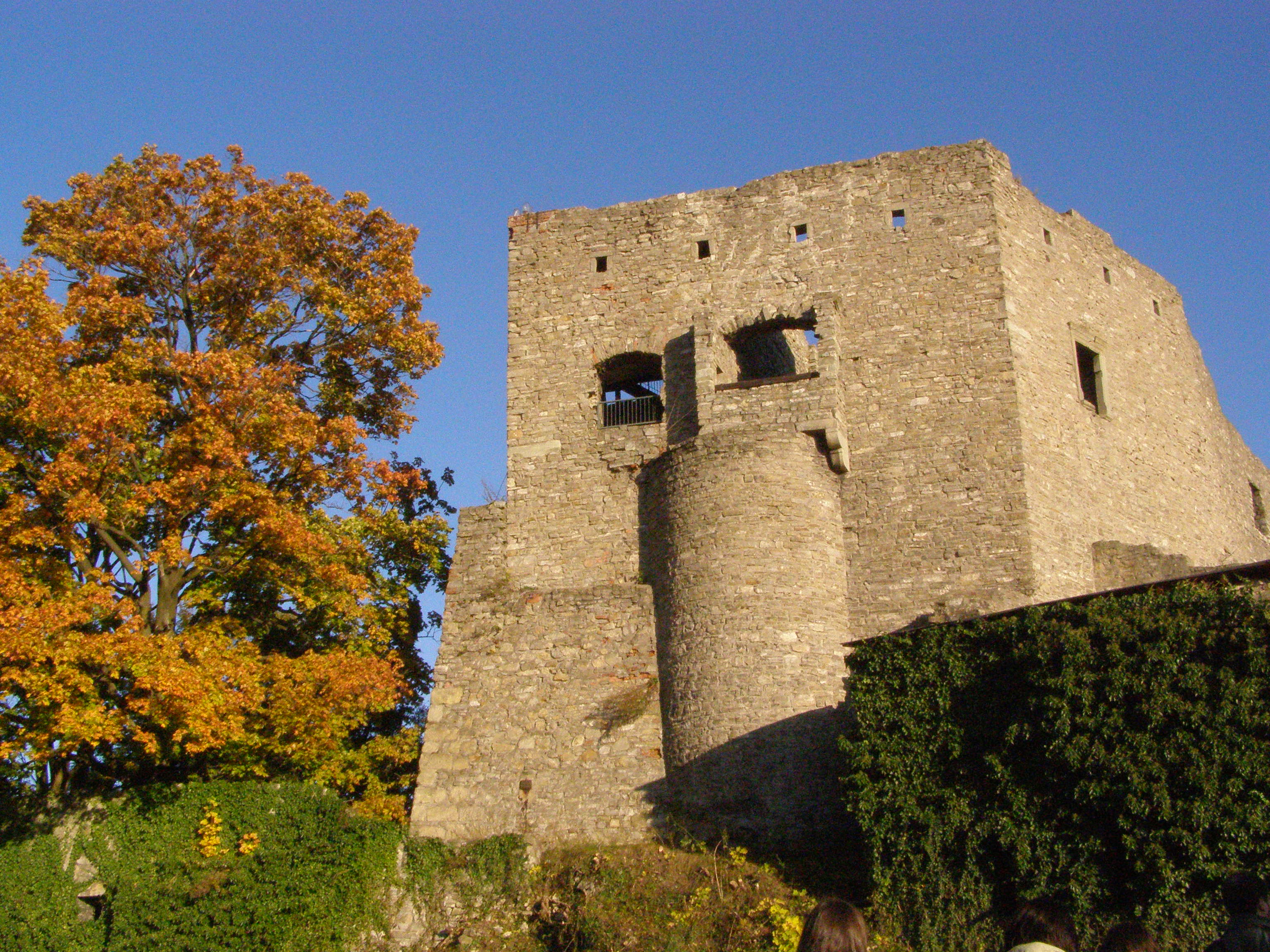 Hukvaldy, hrad Hukvaldy, jádro hradu